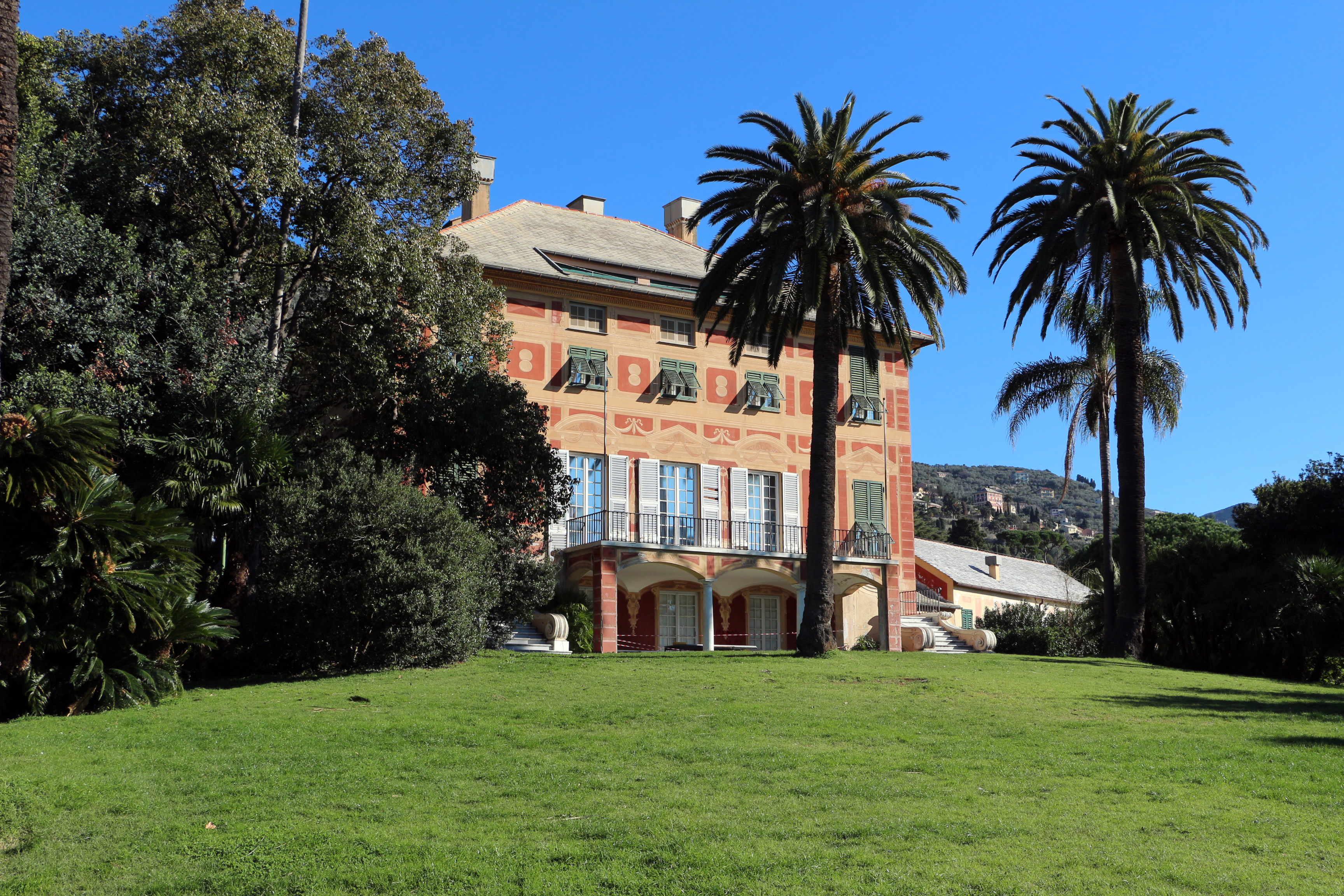 Il parco e i musei di Nervi This is a photo of a monument which is part of cultural heritage of Italy.